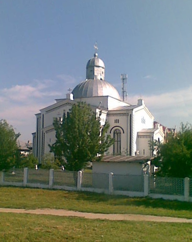 Biserica Sfinții Arhangheli Mihail și Gavril din Buzescu, județul Teleorman, România.